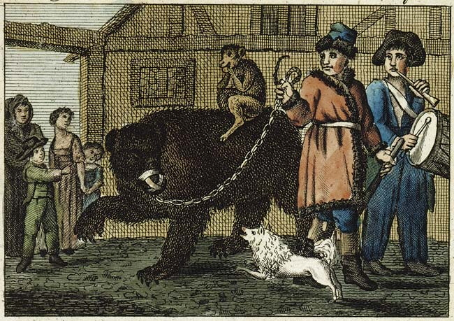 Tafel V, aus: Johann Ferdinand Schlez, BilderFibel zur Beförderung der LautMethode. Ein Versuch die Absicht des ABC-Bilderwesens durch eine neue Anwendung desselben besser zu erreichen, nebst einem Lesebuch. Giessen [u.a.] 1810 Entsprechender Lehrbuchtext: Erklärung der Vten Tafel. Nro. 9) Ein Bär, von seinem Führer an einem Nasenringe durch eine Kette gehalten, brummt seitwärts mit finsterm Angesichte gegen ein kleines Hündchen. M - m - m brummt er. - Was doch der alte Brummer gegen den kleinen Spitz einzuwenden hat? - Je nun, es verdrießt ihn, daß der kleine Belfer mit seinem r - r - r - r ihn anknurrt. Verdenkt ihr das dem gefesselten Helden? - Wie würd' es dem muthwilligen Necker gehn, wenn der Führer den Bären los ließe? Welcher von beiden hier unten stehenden Buchstaben ist der Brumm= und welcher der Marrlaut? Könnt ihr beide auch im Buche finden?